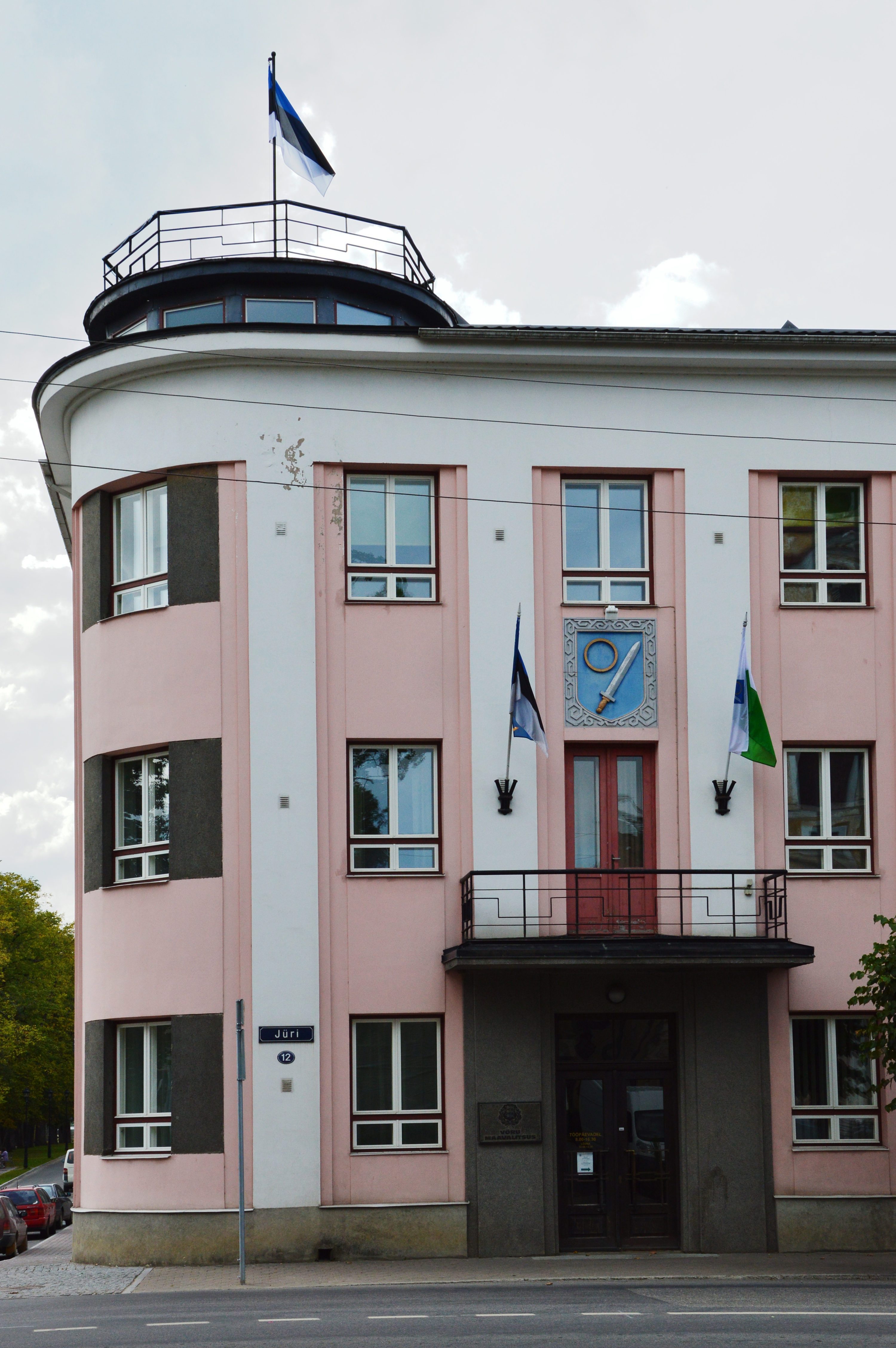 Võru Maavalitsus